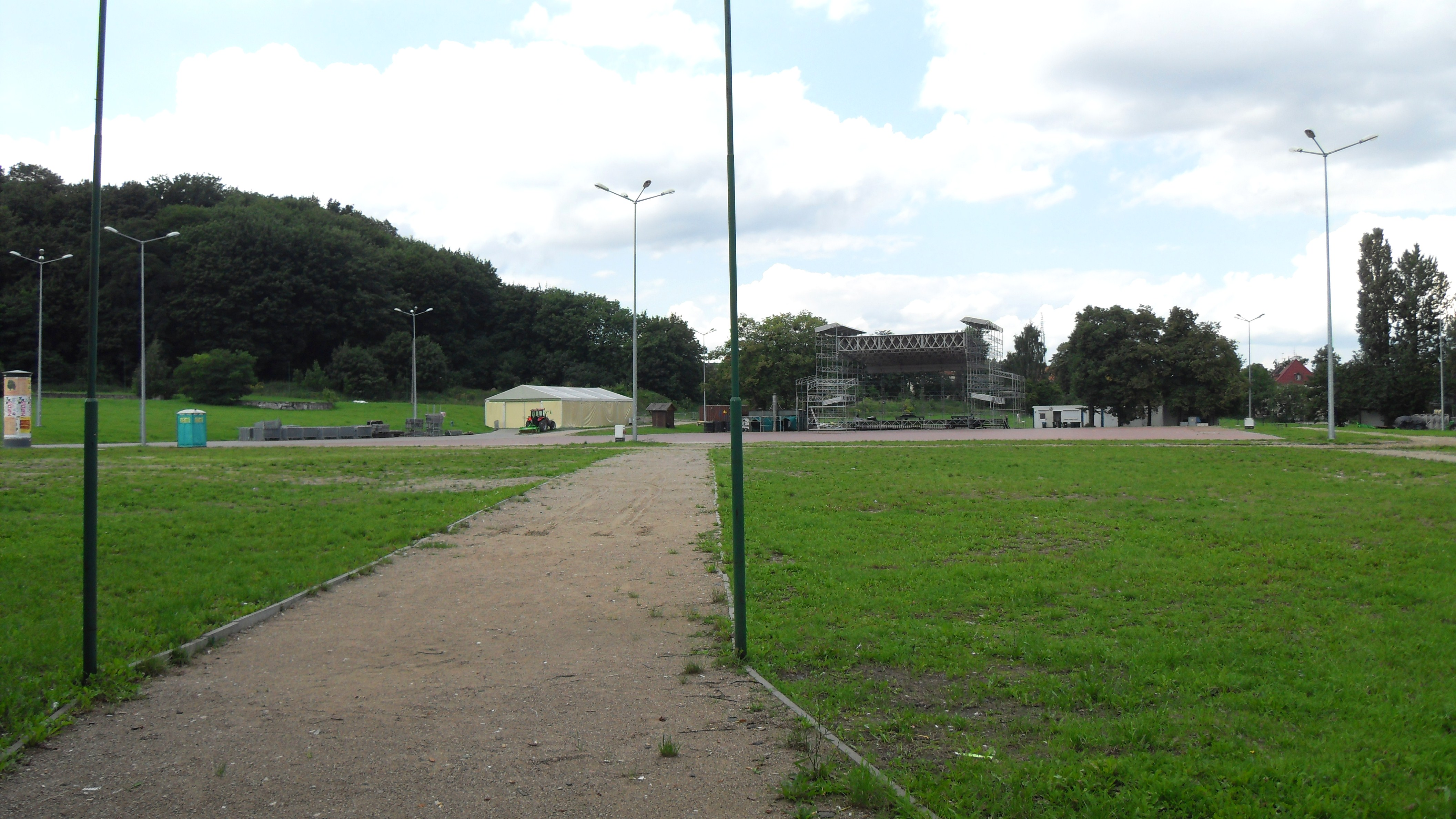 Gdańsk, Plac Zebrań Ludowych.